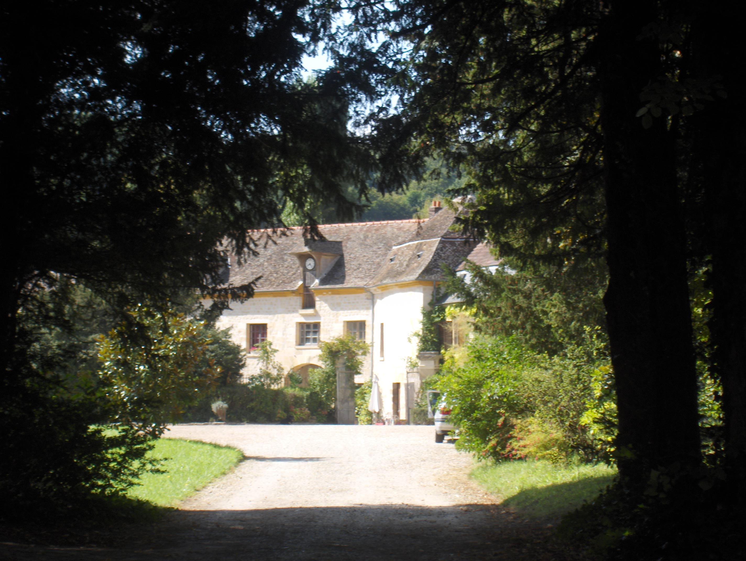 Vue partielle du château et ferme d'Orgivaux à Valmondois (Val-d'Oise)